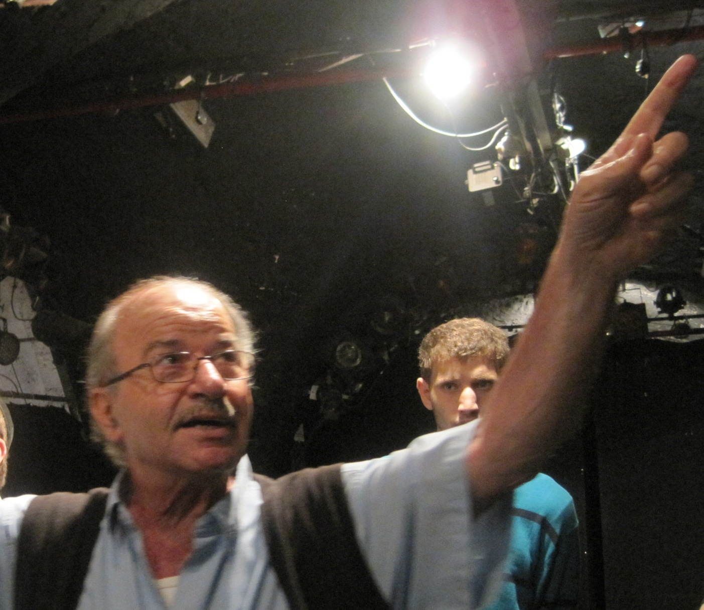 Elef Millim - Jaffa